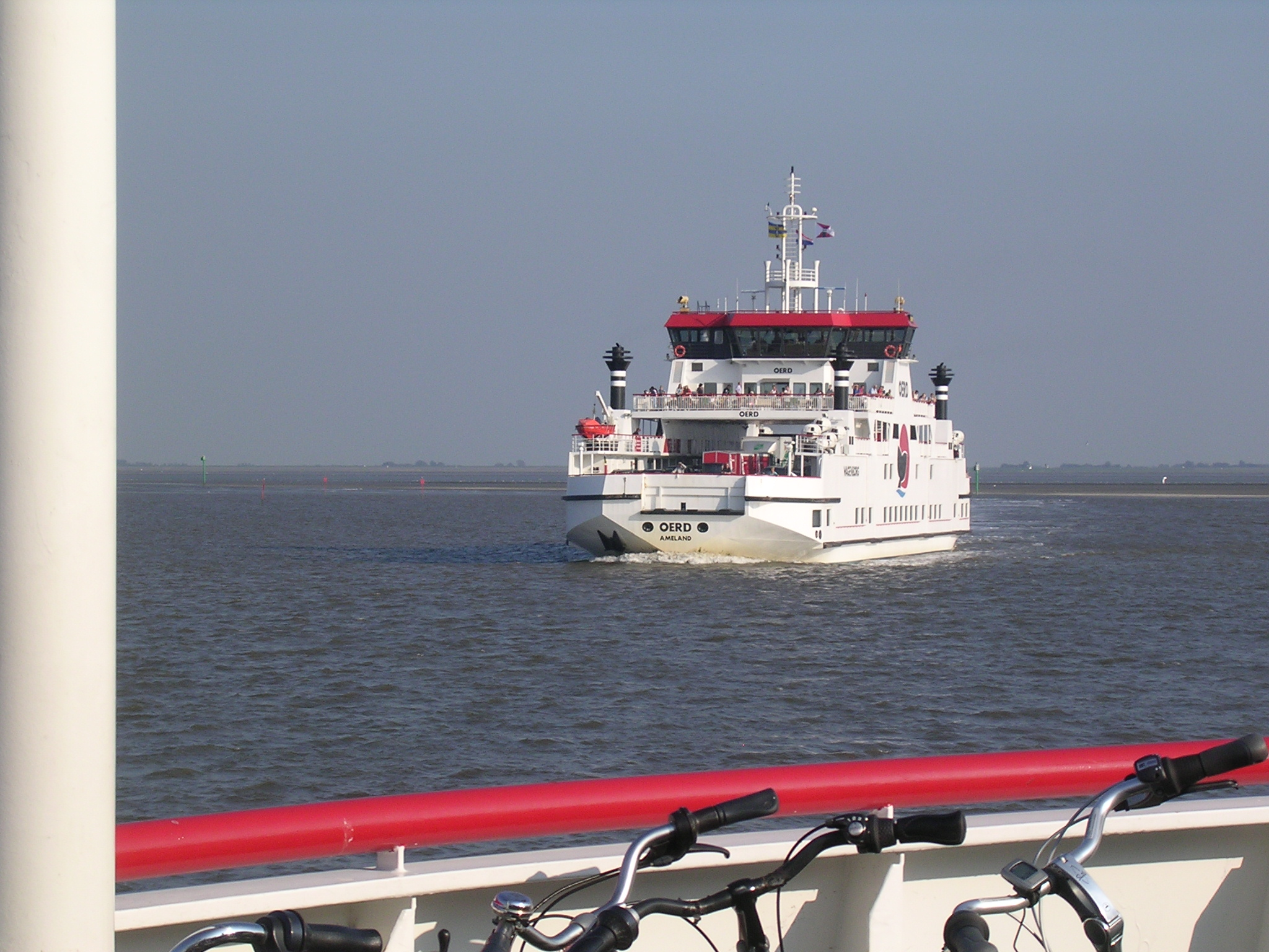 wer't in dei nei't Amelân al net goed foar is.